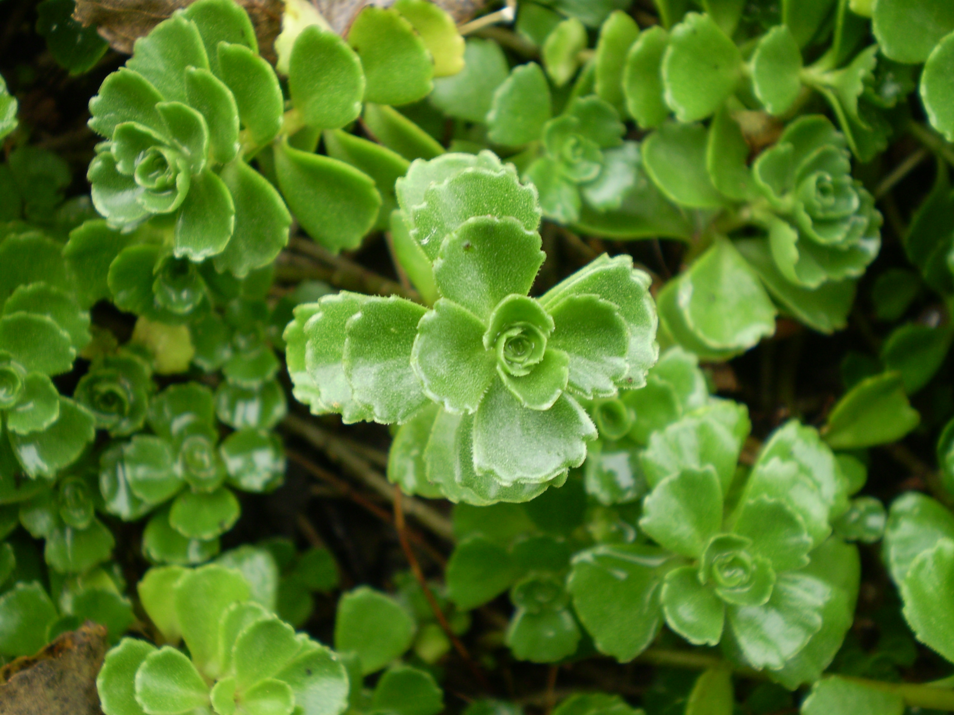 Sedum spurium album superbum . vetkruid .